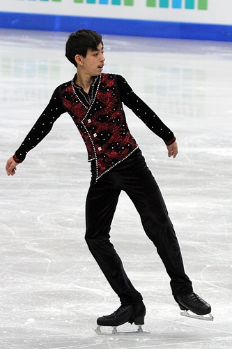 Мишель Кристиан Мартинез (Филиппины) на чемпионате мира по фигурному катанию среди юниоров 2012